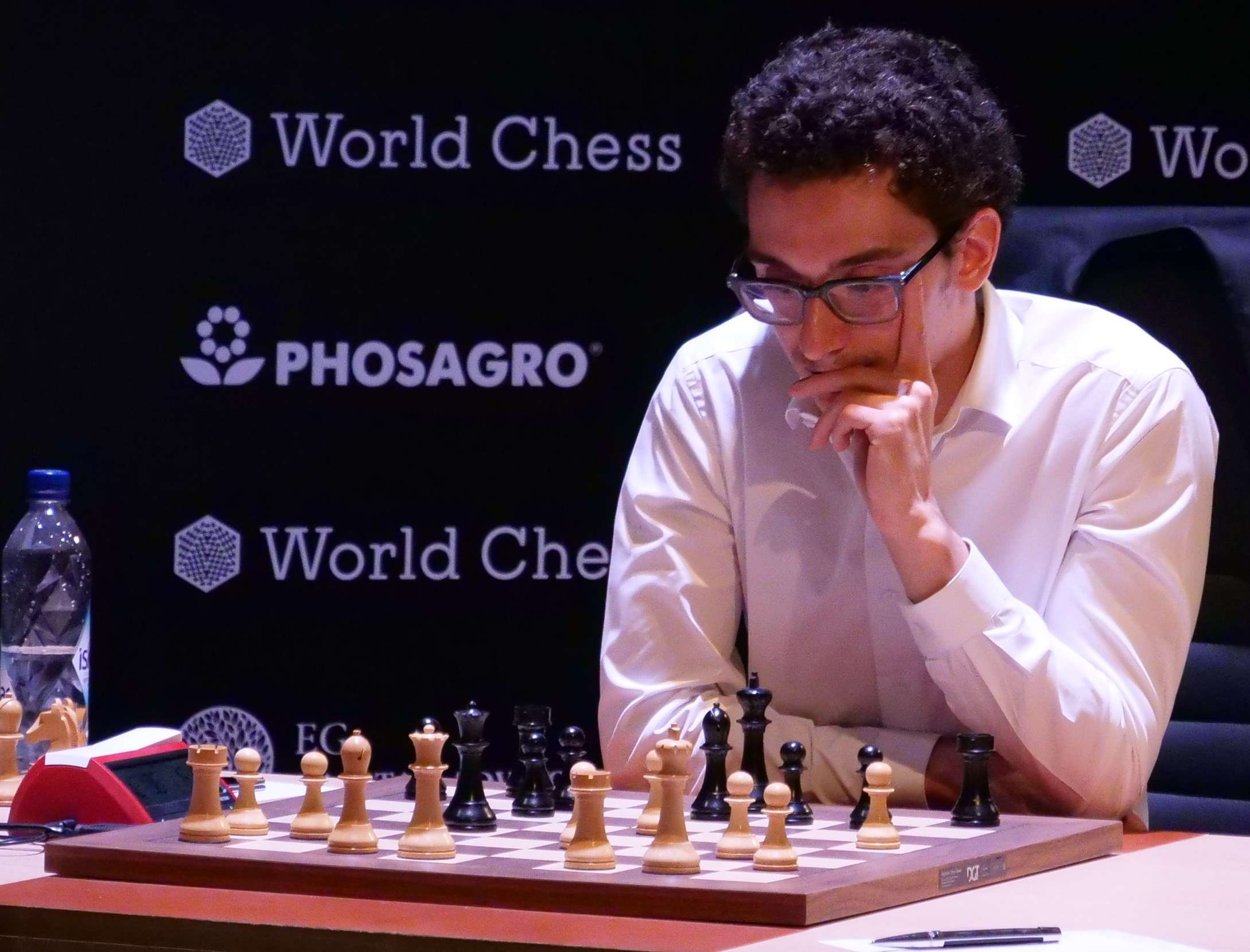 Caruana-Məmmədyarov-Kandidatenturnier Berlin 2018 Runde 10